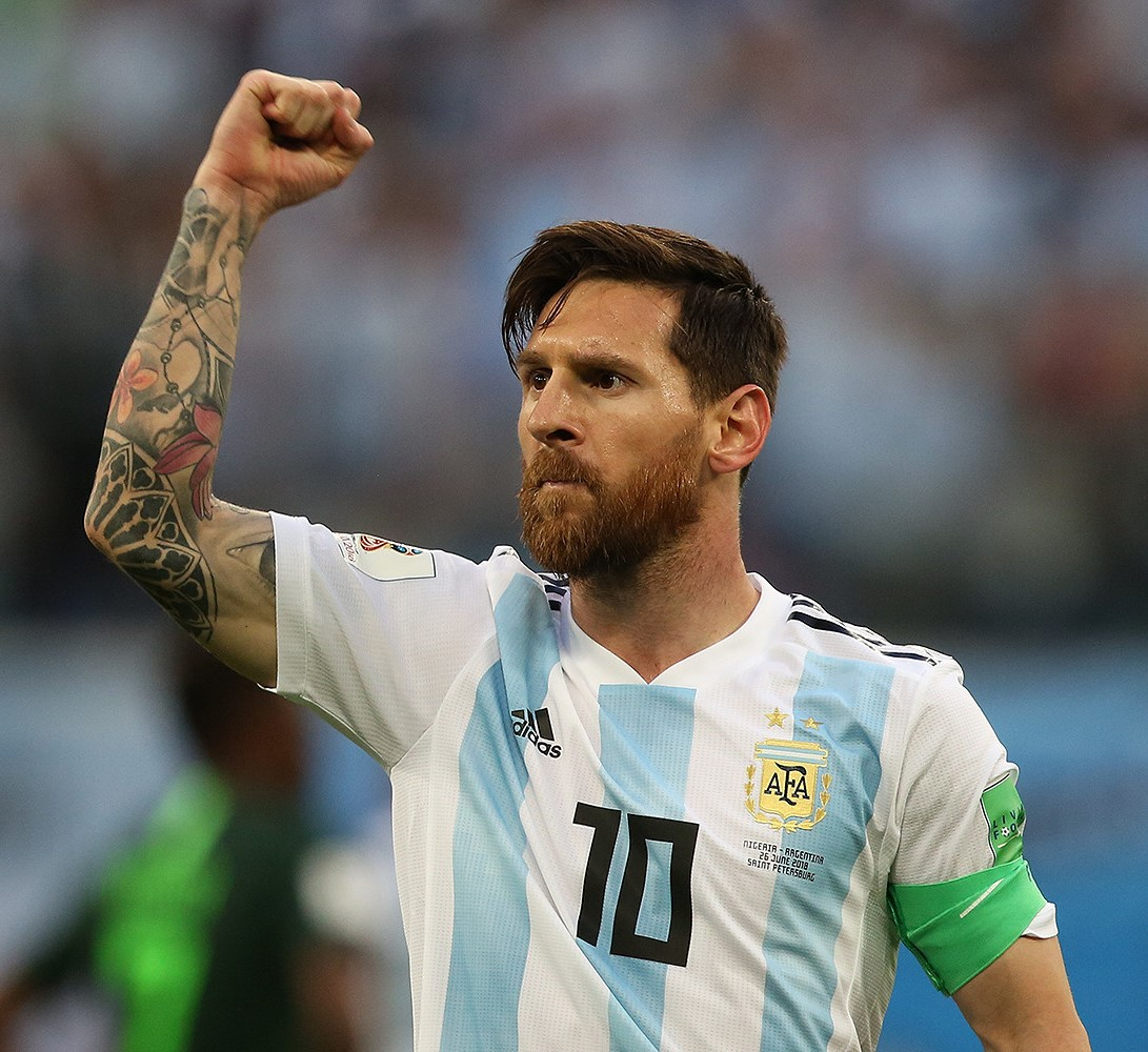 Гол Рохо в концовке выводит Аргентину в плей-офф чемпионата мира